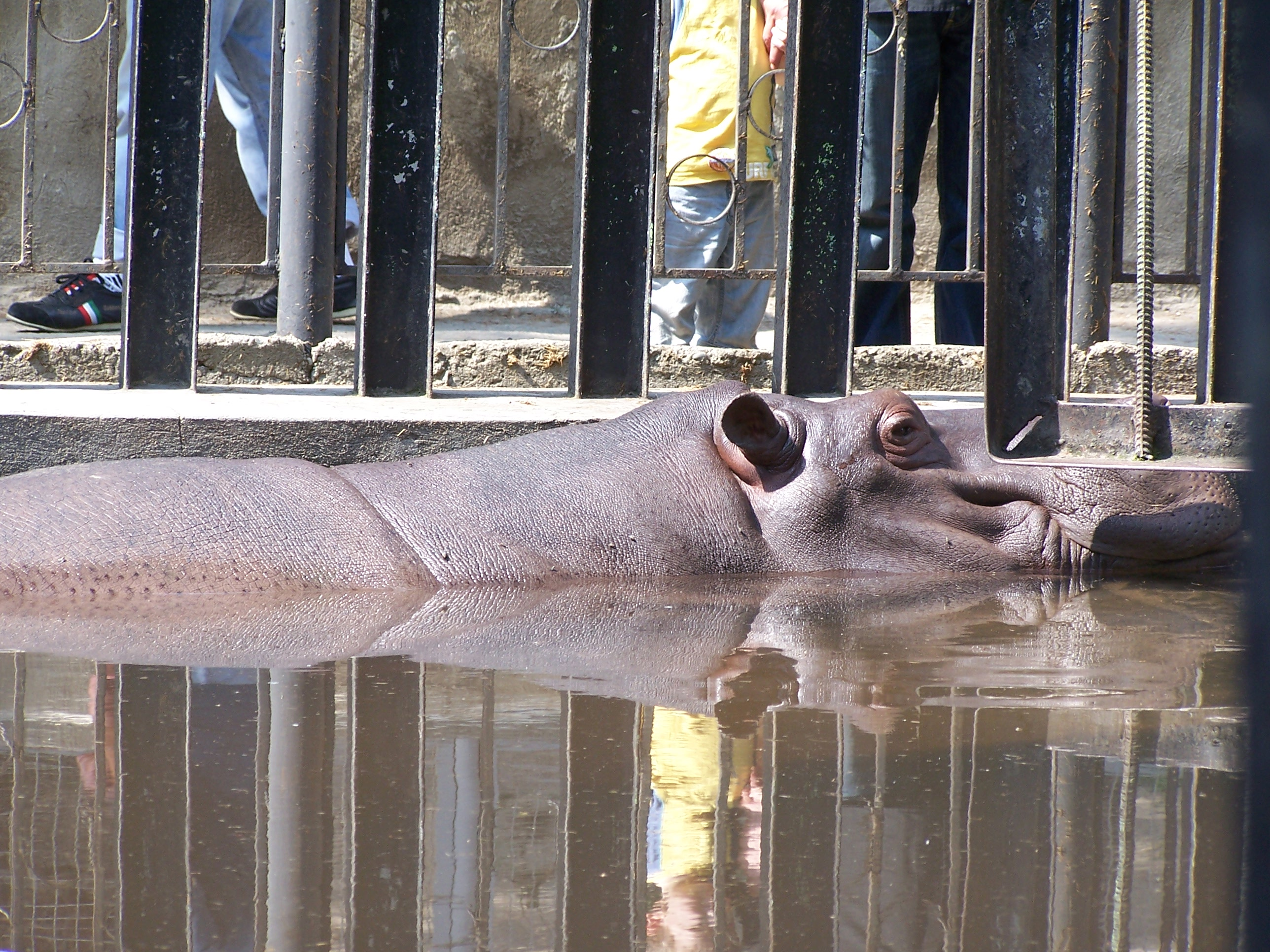 Big Hippo